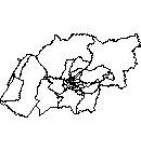 mapa del distrito de arequipa